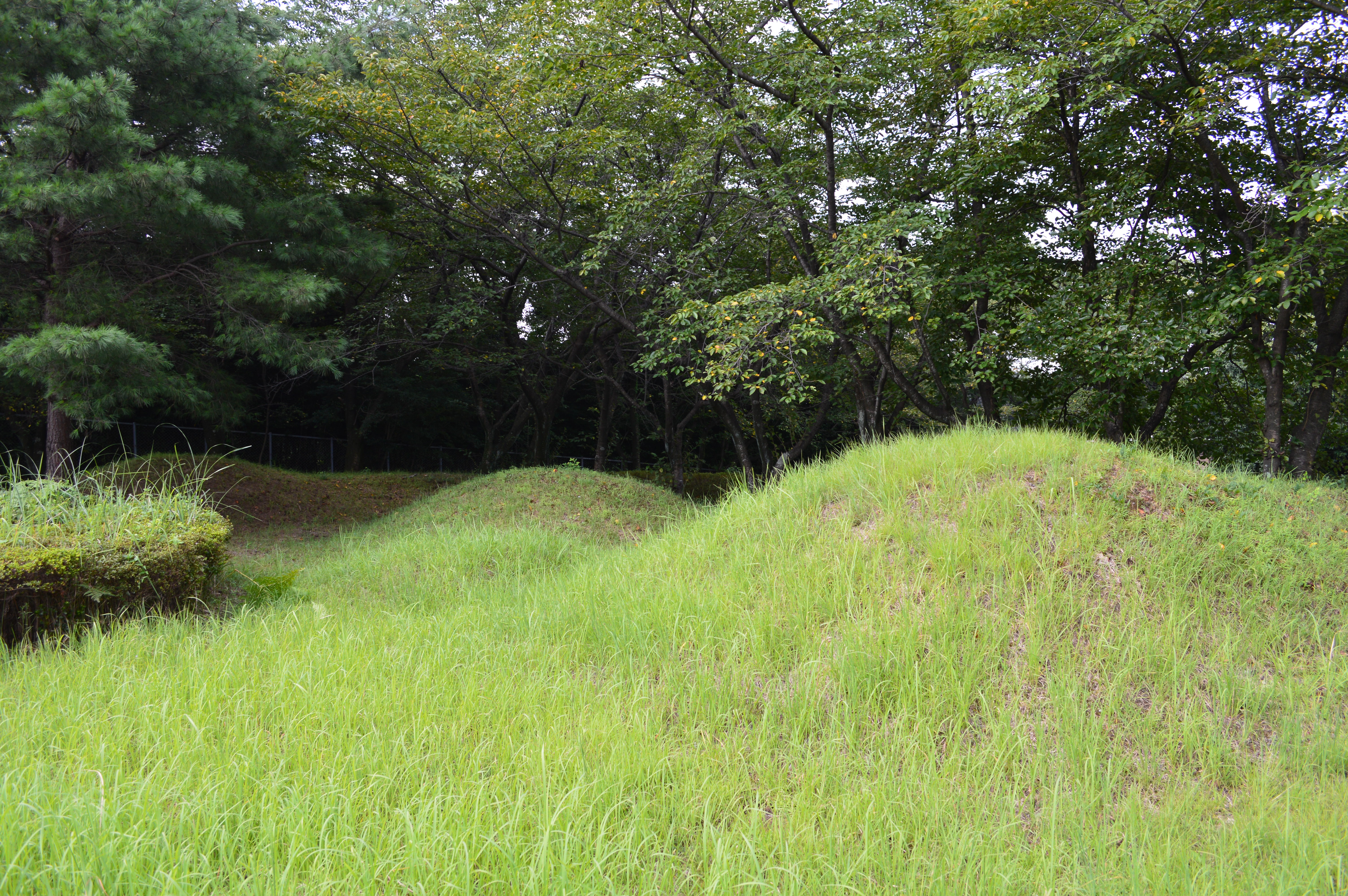 都紀女加王墓 陪塚